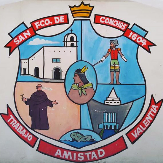 Escudo del San Francisco de Conchos